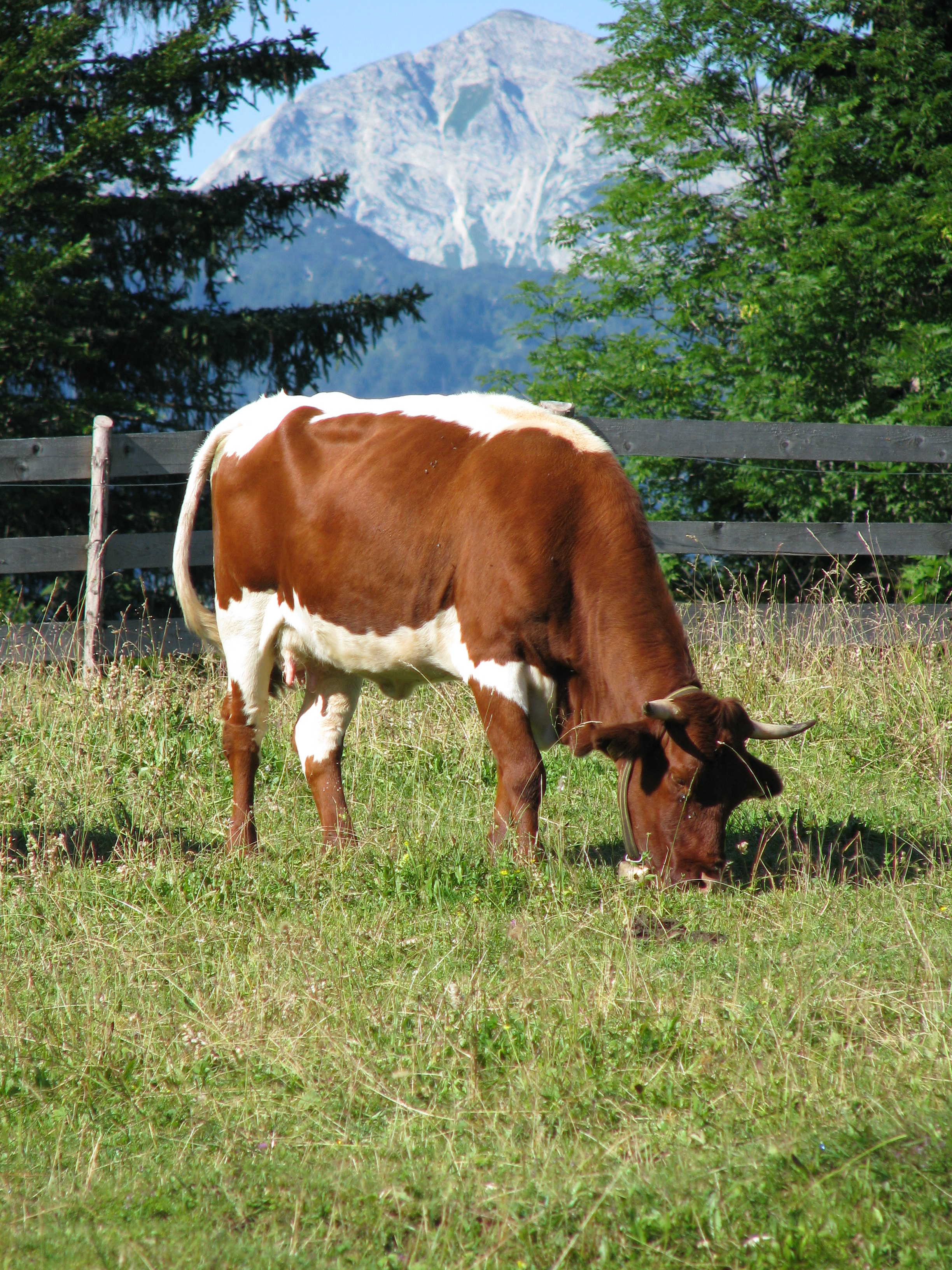 Cikasta krava na Uskovnici